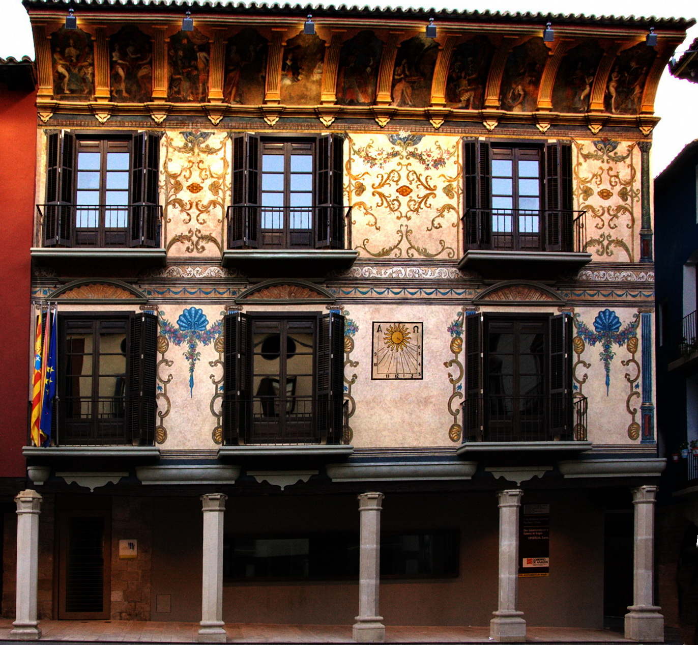 Casa Heredia a la plaça Major de Graus (Osca-Espanya)